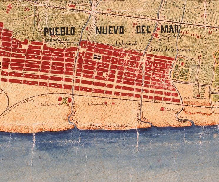 Cabanyal-Canyamelar el 1883 (el nord està a la dreta).